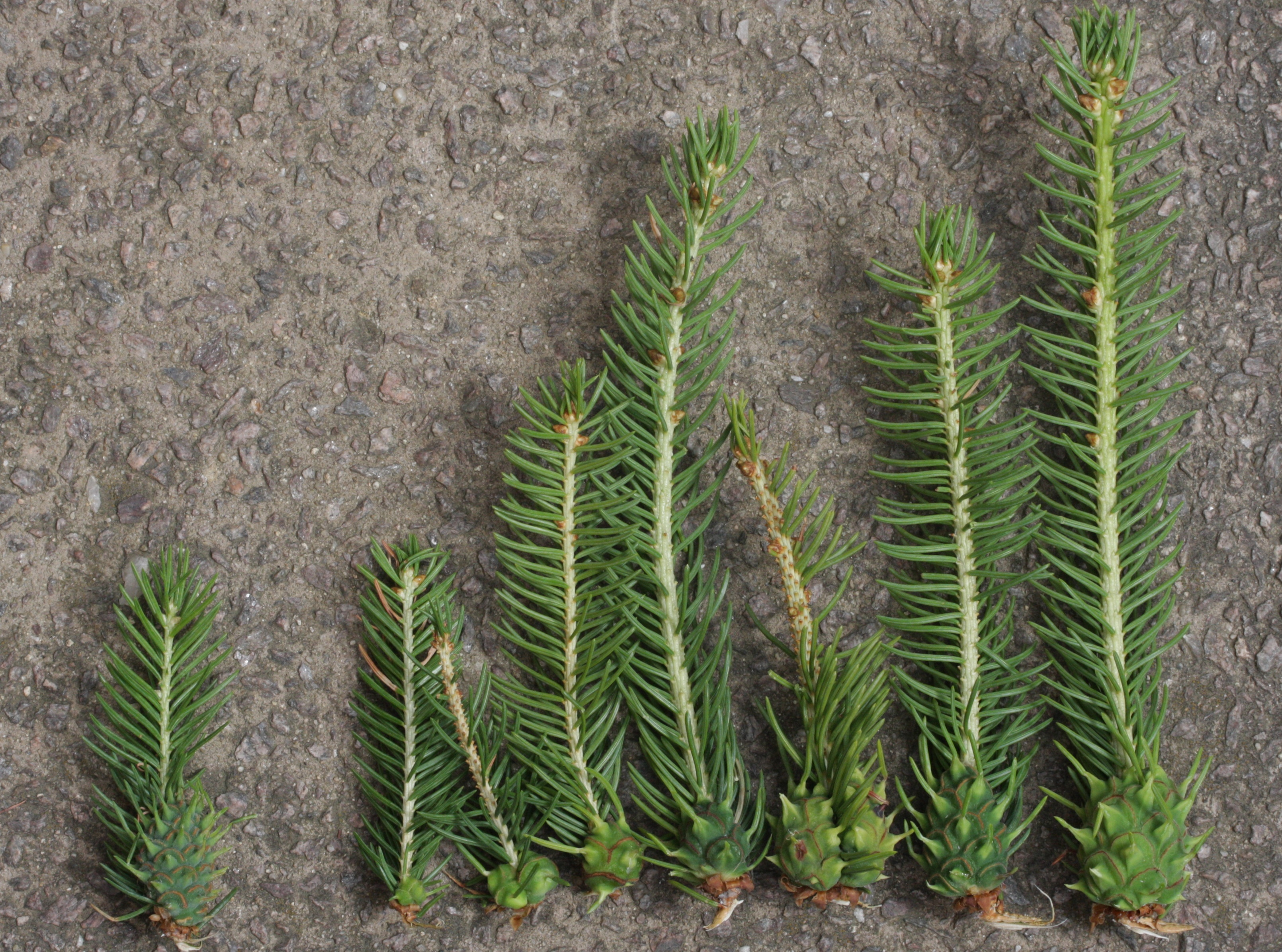 Gallen an Fichtenzweigen, entstanden durch den Befall mit Fichtengallenläusen